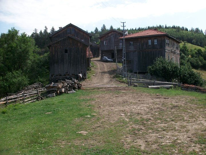 Een typisch dorp met houten huizen in Azdavay